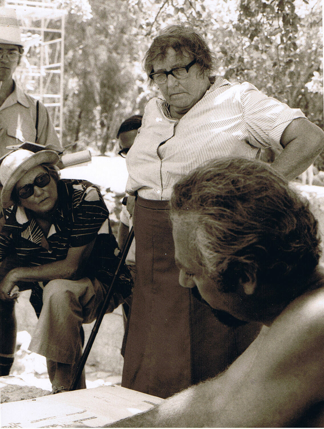 Vassilios Tzaferis – Israeli Archaeologist וסיליוס צפיריס, ארכאולוג ישראלי ממוצא יווני. נולד באי סאמוס ביוון. חבר בקהילה היוונית בישראל. חפר בבניאס, כורסי כפר נחום ועוד. Vassilios Tzaferis with Kathleen Kenyon in the year 1977 תמונה שצולמה ב1977 בחפירות ארכאולוגיות מימין צפיריס במרכז קתלין קניון